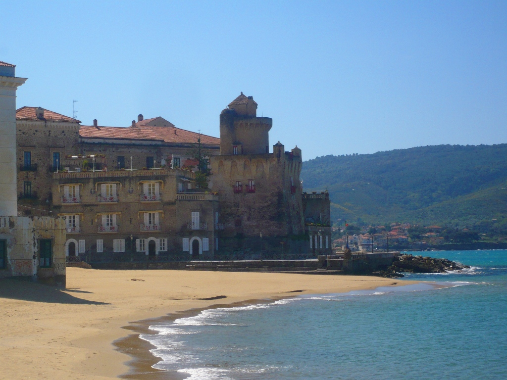 Torre pagliarola sulla spiaggia di marina piccola a s.maria di castellabate (salerno)